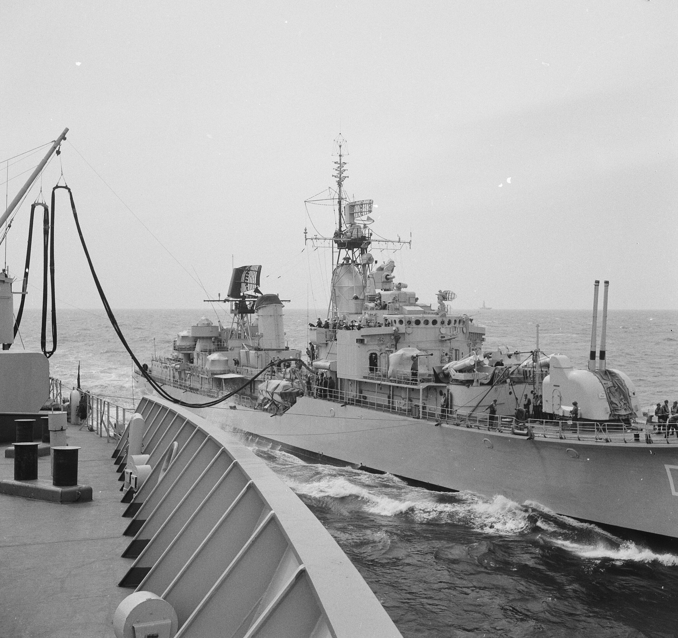 Collectie / Archief : Fotocollectie Anefo Reportage / Serie : [ onbekend ] Beschrijving : Demonstratietocht H.M. Poolster , jager koningin Juliana Amsterdam "zoogt" de Poolster Datum : 2 september 1965 Locatie : Amsterdam, Noord-Holland Trefwoorden : demonstratietochten, jagers, schepen Persoonsnaam : H.M. Poolster, Juliana (koningin Nederland) Fotograaf : Voets, Jan / Anefo Auteursrechthebbende : Nationaal Archief Materiaalsoort : Negatief (zwart/wit) Nummer archiefinventaris : bekijk toegang 2.24.01.03 Bestanddeelnummer : 918-1302